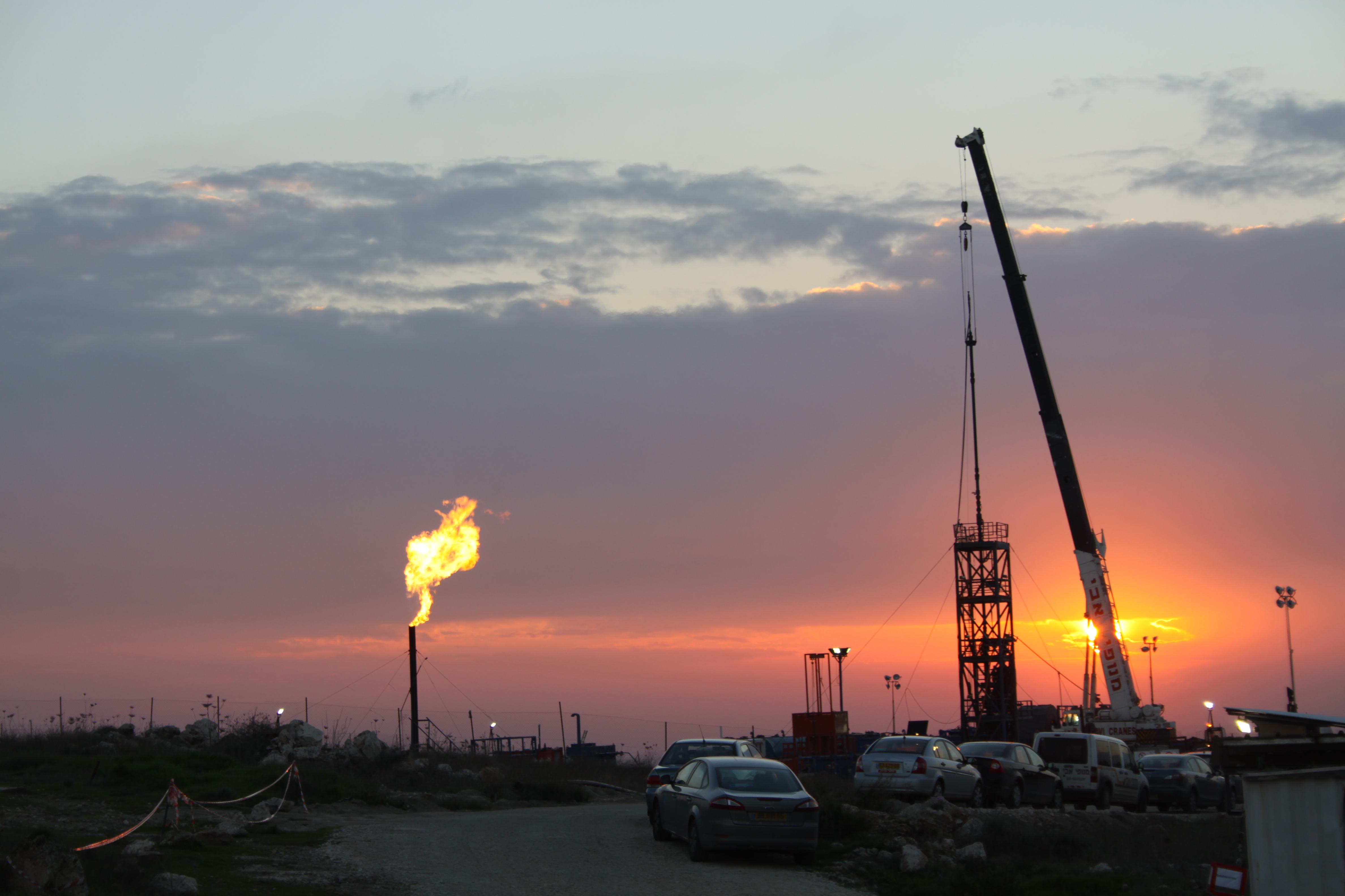 מגד_בשקיעה.jpg